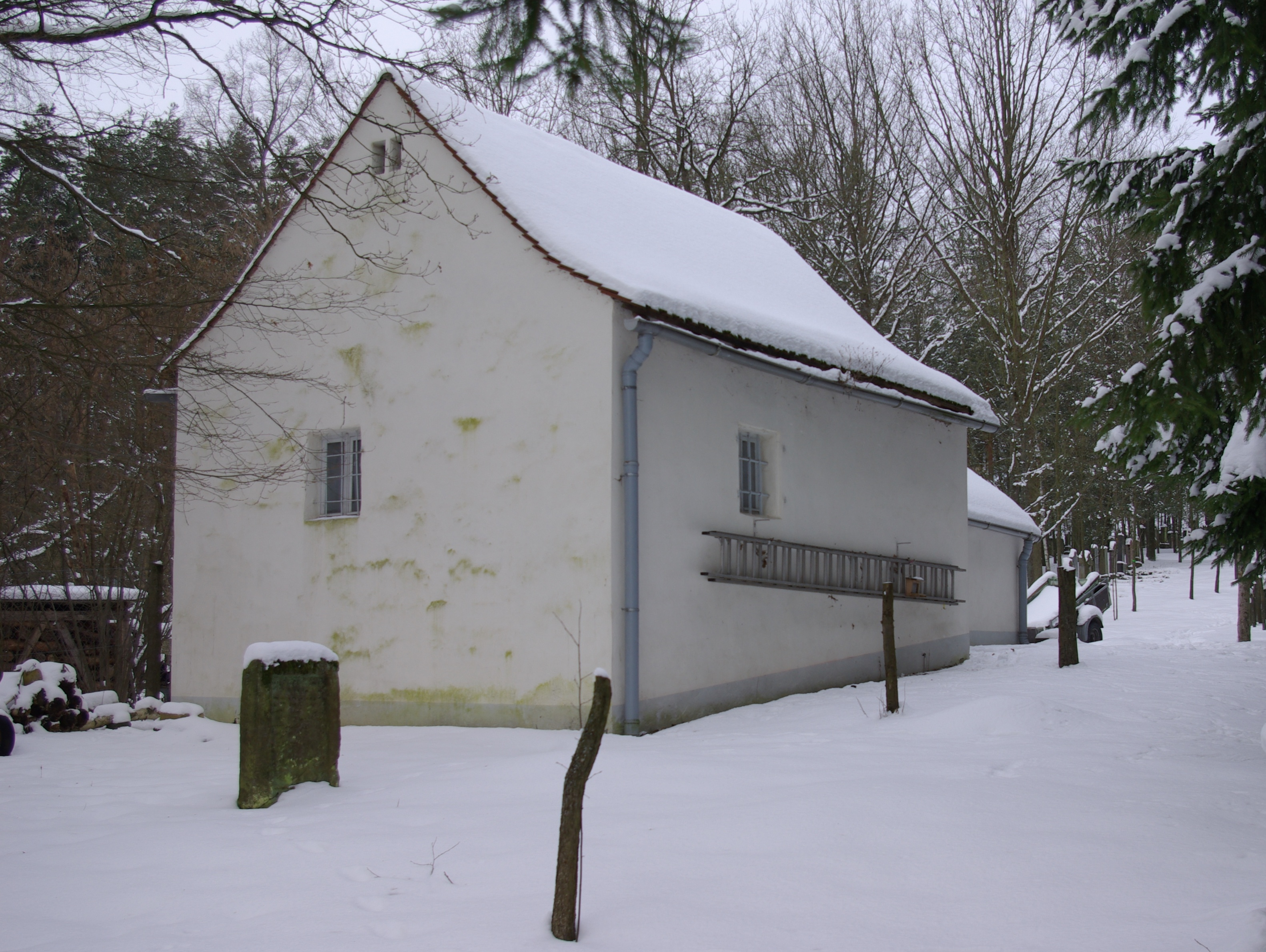 Jüdischer Friedhof in Zeckern, Gemeinde Hemhofen